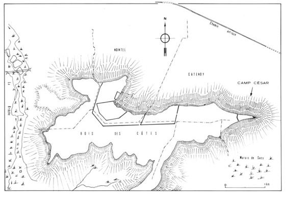 Croquis du camp de César, sur les hauteurs de Catenoy